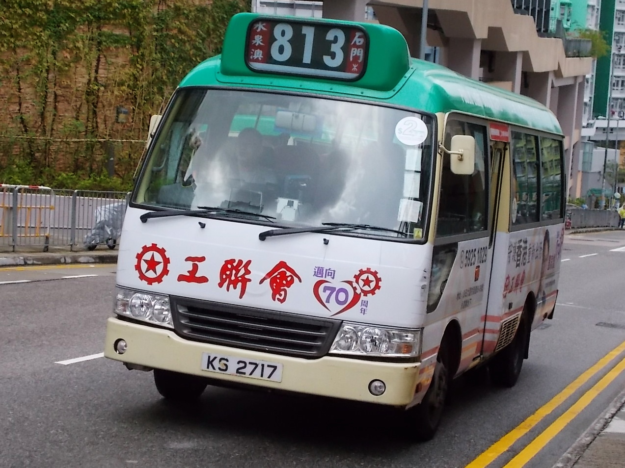 新界專線小巴813線